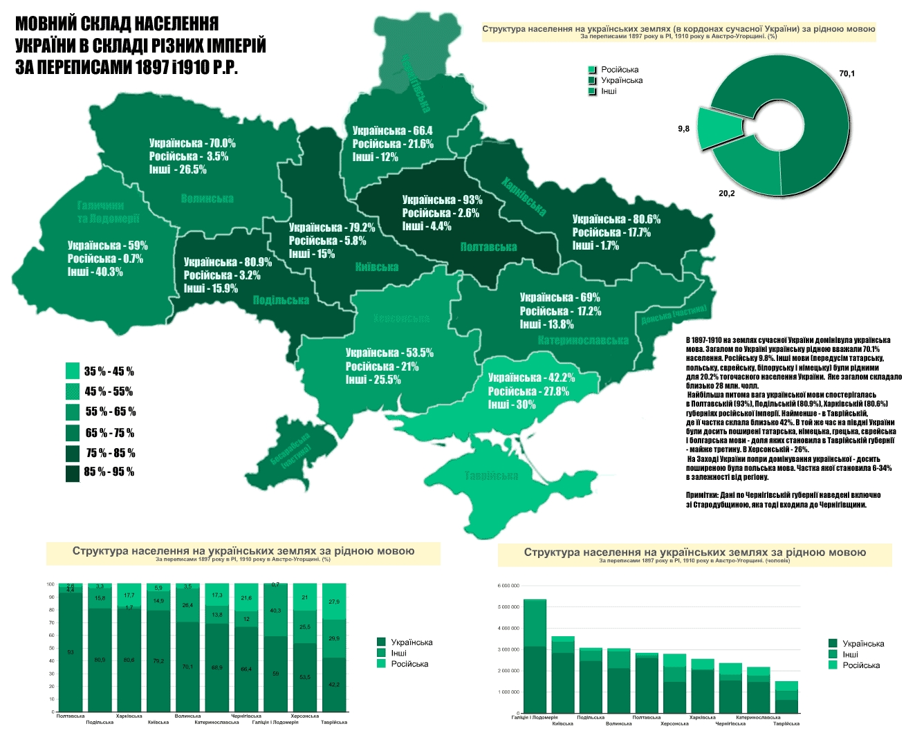 Мовний склад населення України за переписами 1897 та 1910 років.Поширення української, російської та інших мов на теперишній території України в 1897 - 1910 роках.